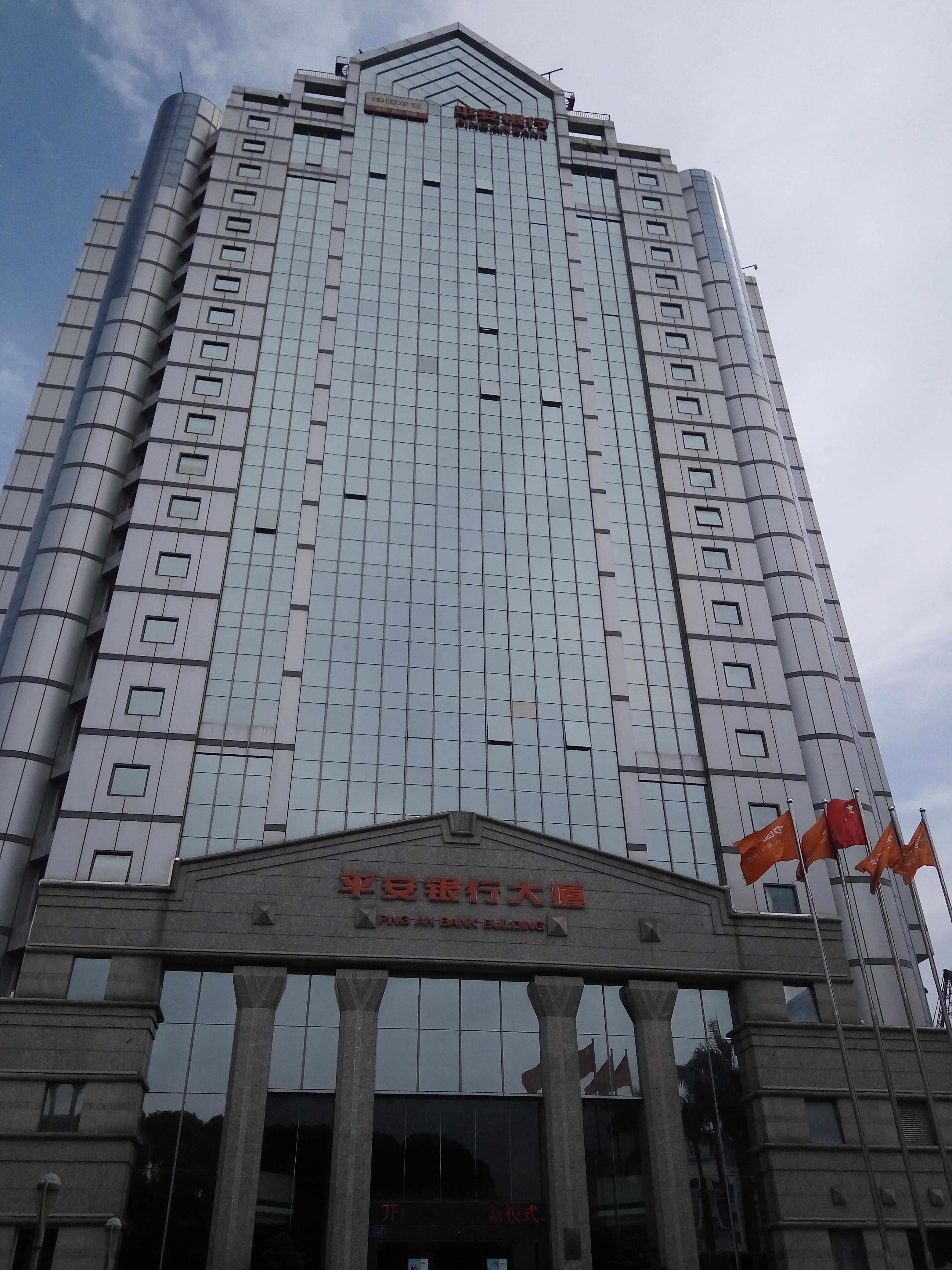 平安银行深圳分行大厦（原深圳商业银行大厦）